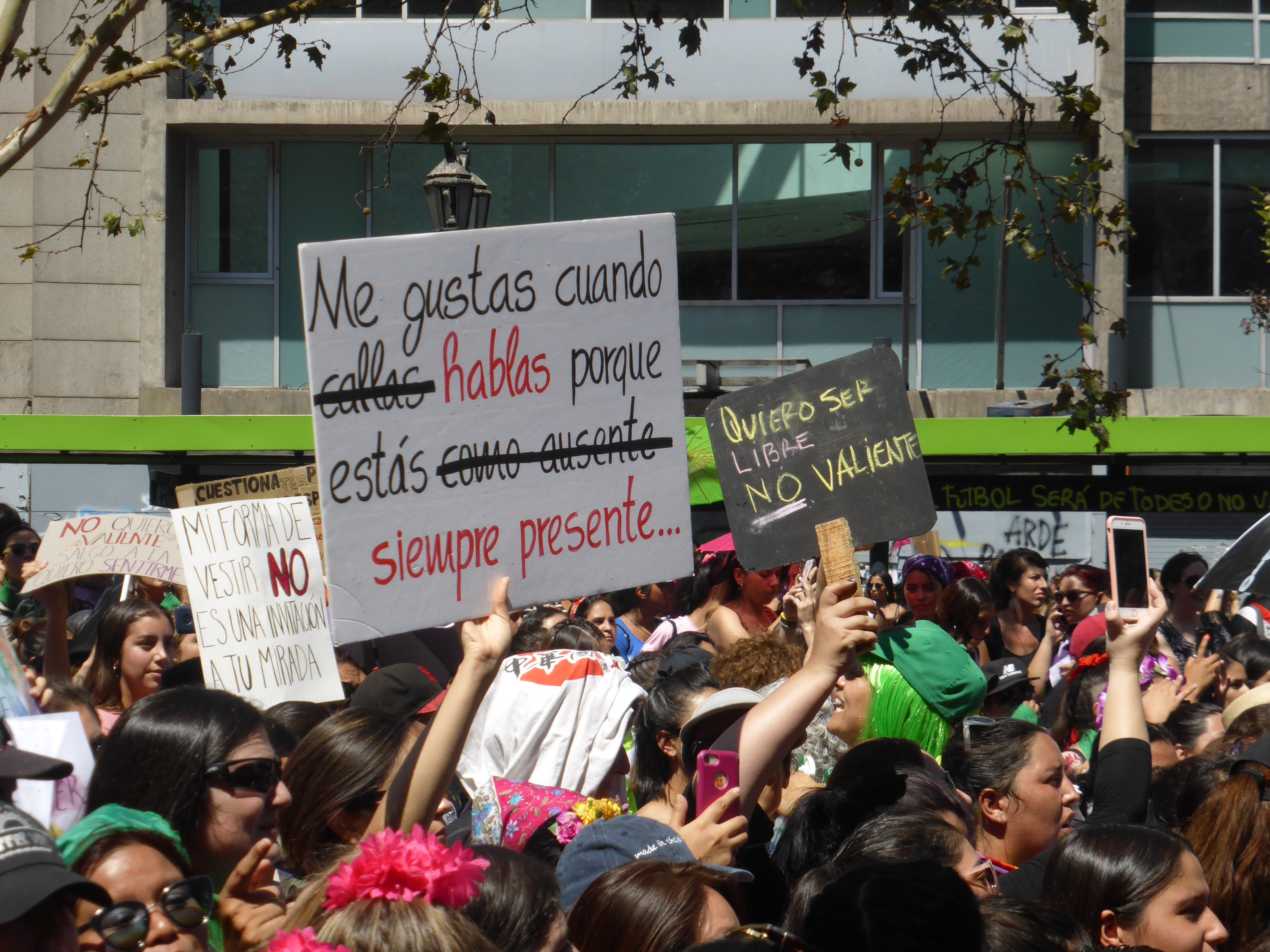 Manifestación en el Día Internacional de la Mujer, 8M. Marcha feminista. En uno de los carteles se modifica el poema número 15 del libro "Veinte poemas de amor y una canción desesperada" de Pablo Neruda. Me gustas cuando callas porque estás como ausente se cambia por Me gustas cuando hablas porque estás siempre presente.